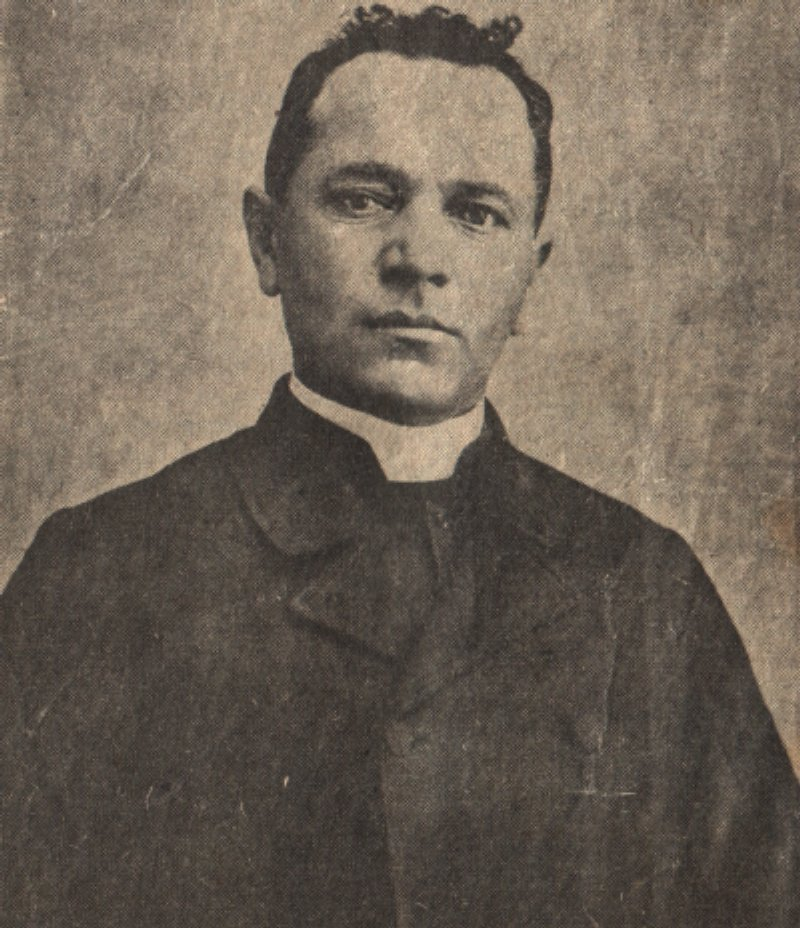 მიხეილ თამარაშვილი